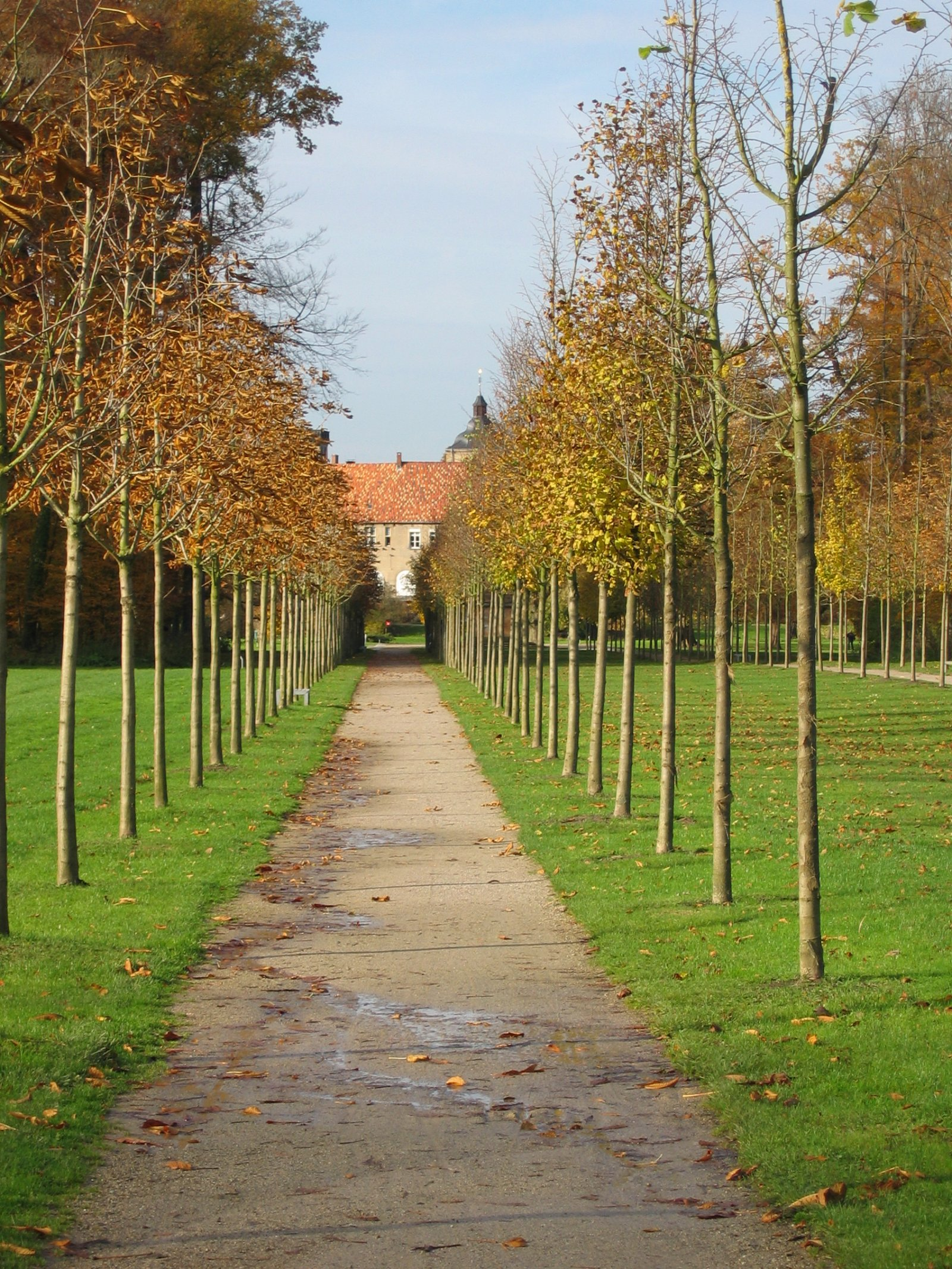 Bagno-Allee: die im Jahr 2003 wieder hergestellte „Große Allee“ im Steinfurter Bagno, mit Blick auf das Schloss Burgsteinfurt